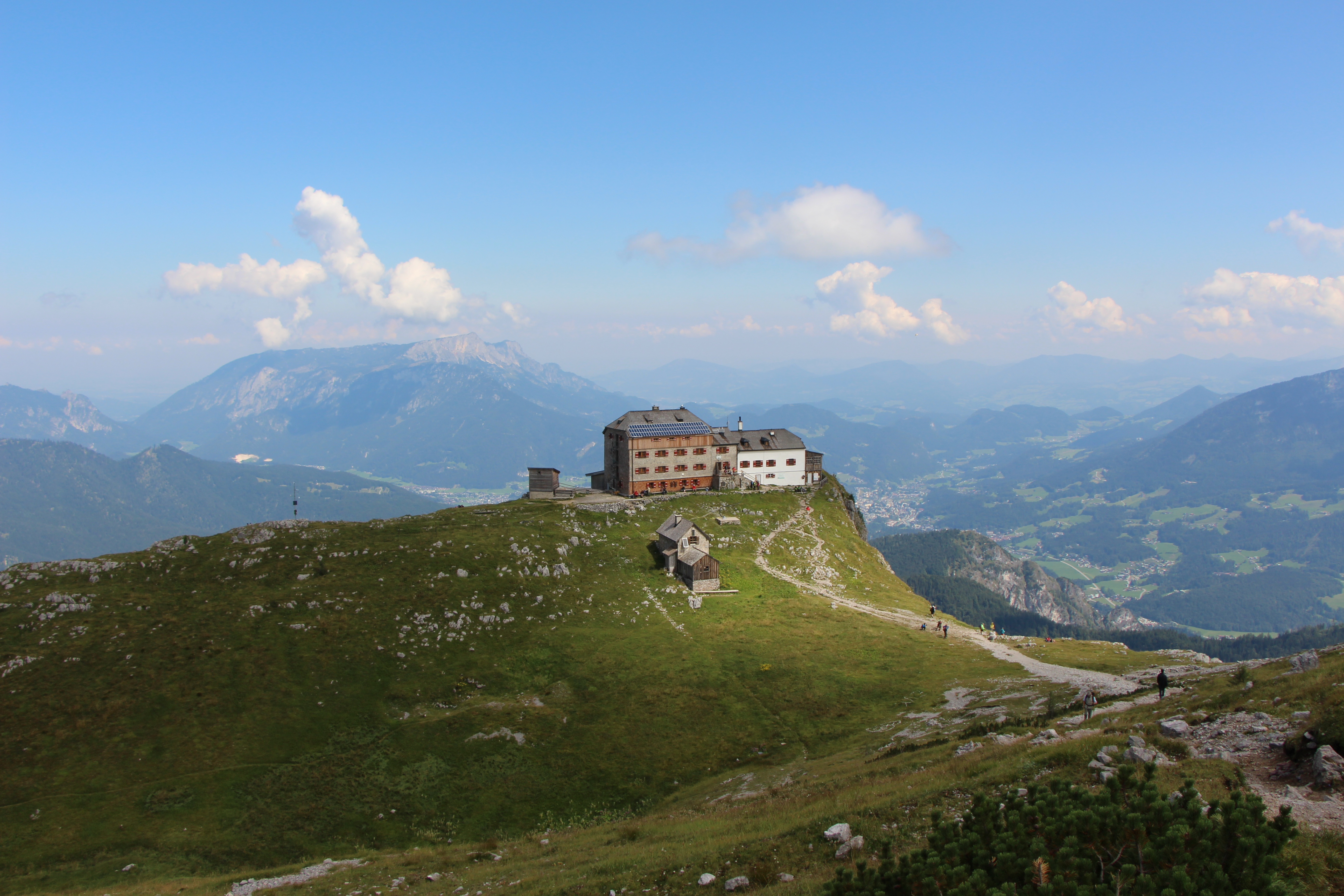 Watzmannhaus fotografiert beim Aufstieg auf die Mittelspitze.